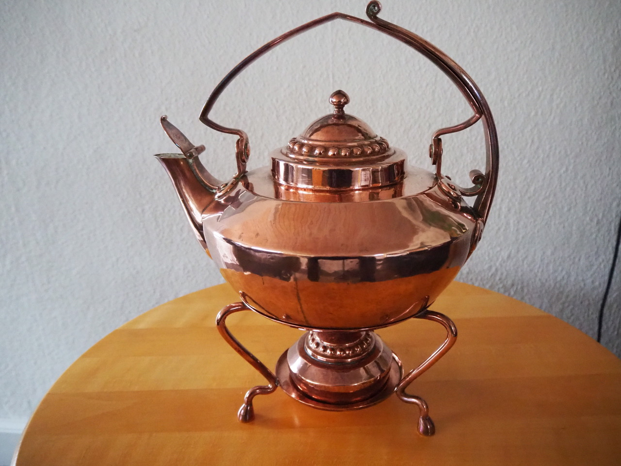 Kobberkedel tegnet af Brendekilde og udført af Ole Rasmussen (1899, selve kedlen er 17 cm høj med diameter 23 cm, foto Ole Denager)